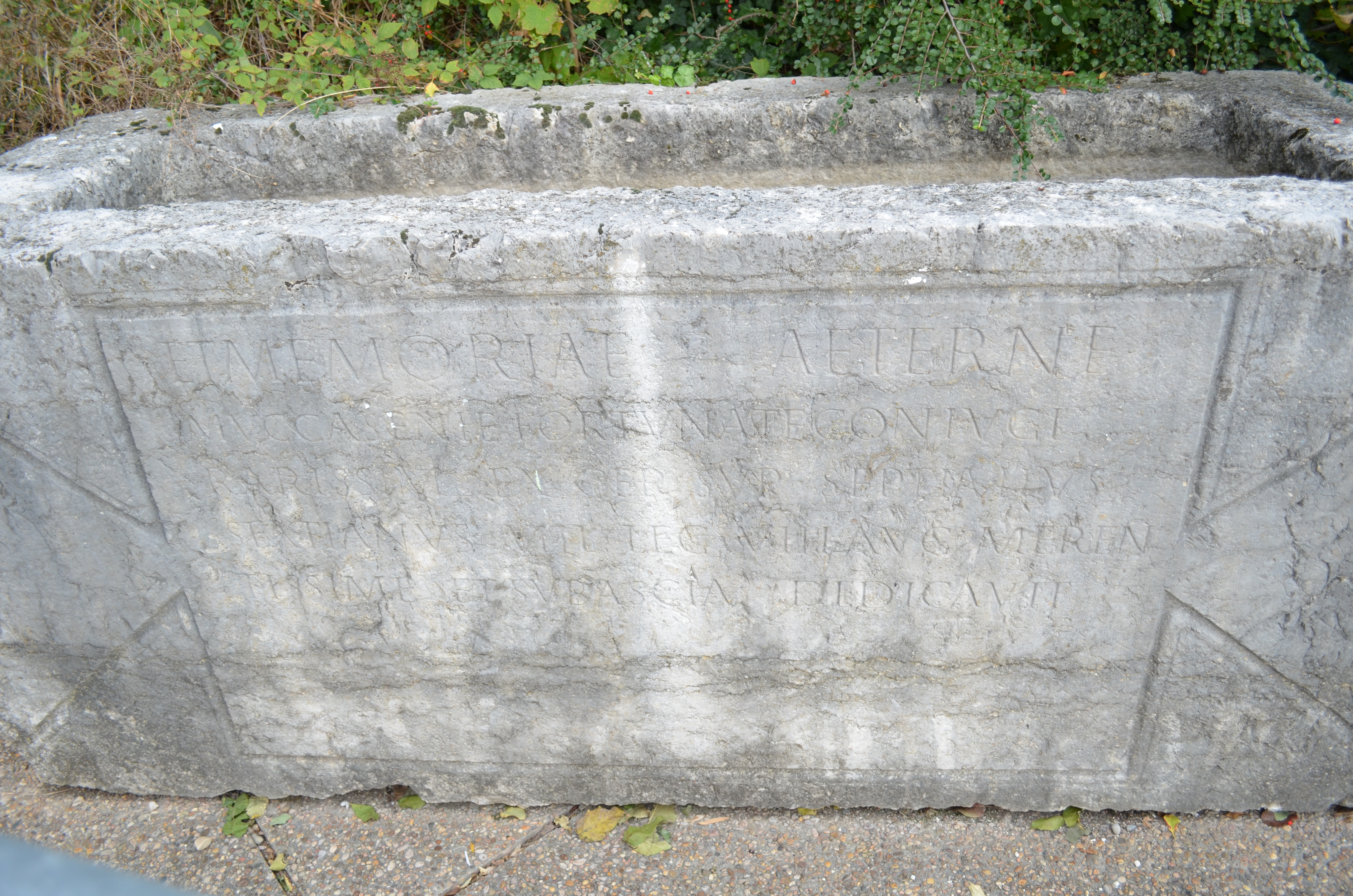 Musée gallo-romain de Fourvière (Lyon) - Jardin archéologique du théâtre antique de Lyon - Sarcophage extrait des fondations de l'ancienne église de Vaise en 1845. Long. 2.40m ; haut. 1m. D(iis) M(anibus) / et memoriae aetern(a)e / Muccasenie Fortunat(a)e, coniugi / rarissim(a)e / ex Germ(ania) Sup(eriore) ; Septimius / Sextianus, mil(es) leg(ionis) VIII Aug(ustae), meren/tissim(a)e et sub ascia dedicavit. : Aux dieux Mânes et à la mémoire éternelle de Mucassenia Fortunata, épouse exceptionnelle, originaire de Germanie Supérieure ; Septimius Sextianus, soldat de la VIIIe légion Augusta, a élevé ce tombeau à son épouse, femme du plus rare mérite, et l'a dédié sous l'ascia.